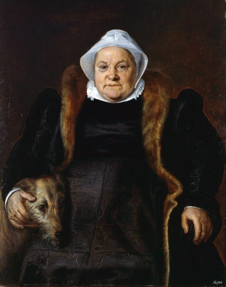 Frans Floris Portrait de dame âgée (ou La femme du fauconnier)